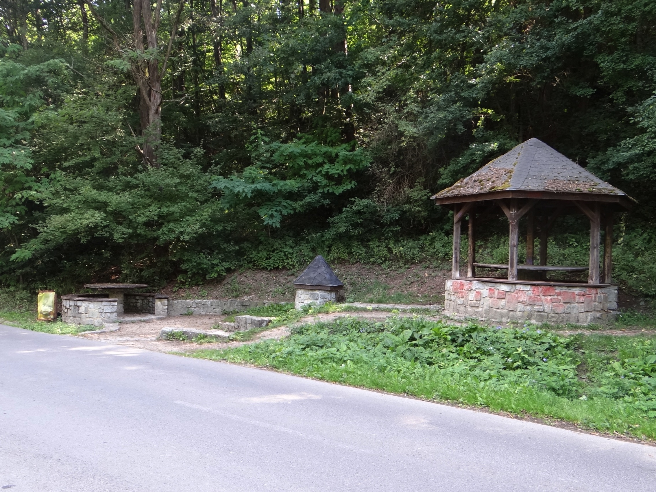 Turčianska Štiavnička. Źródło wody mineralnej